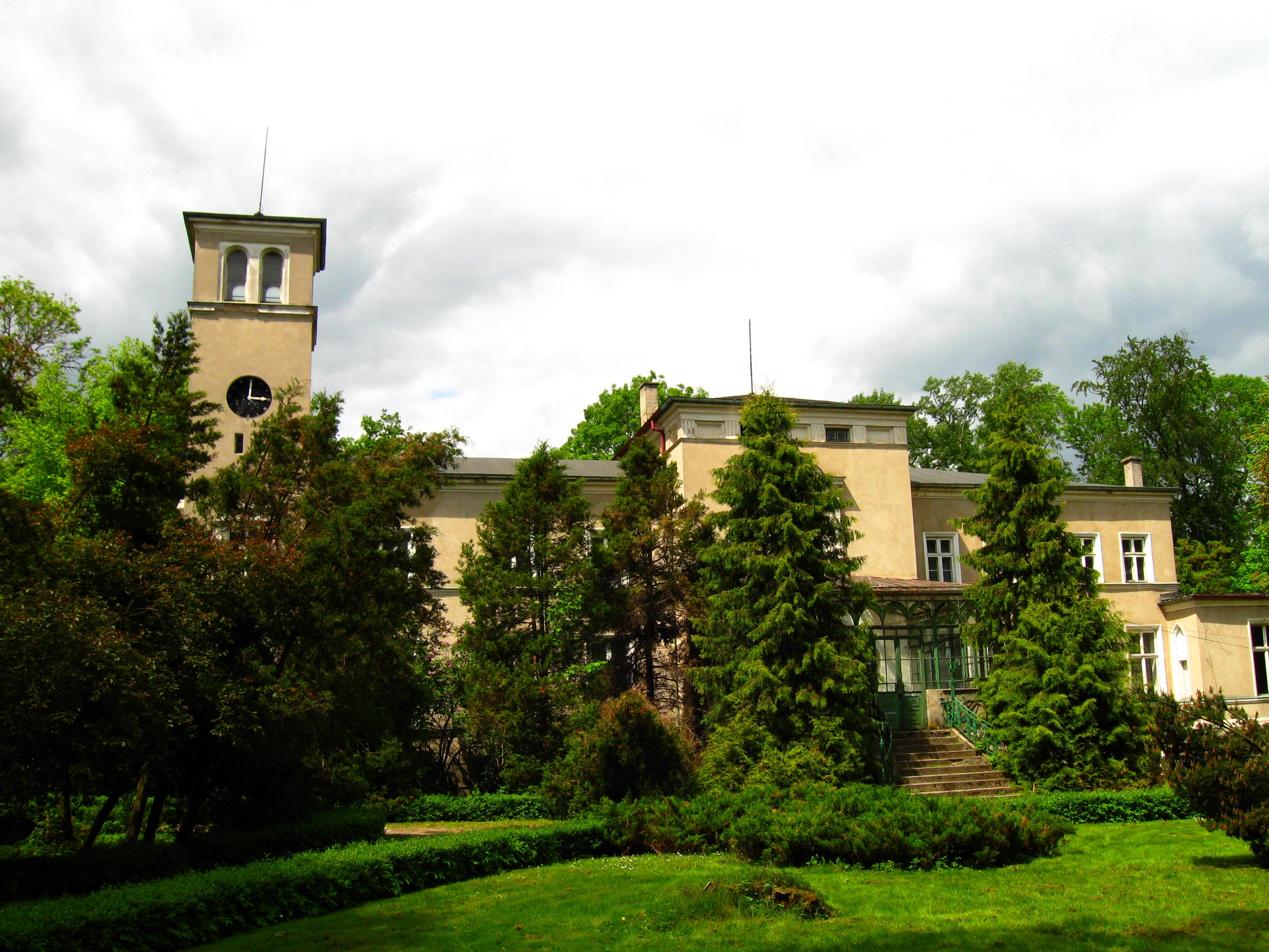 Żelisławki - pałac